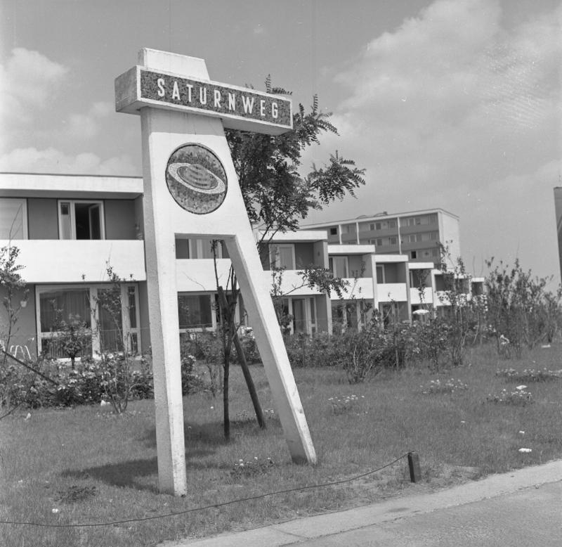 Wohnungsbau: Nürnberg-Zollhaus